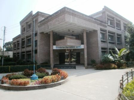 ময়মনসিংহ শহরের একটি আধুনিক শিক্ষা প্রতিষ্ঠান, ২০১১